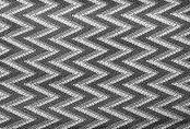 cg